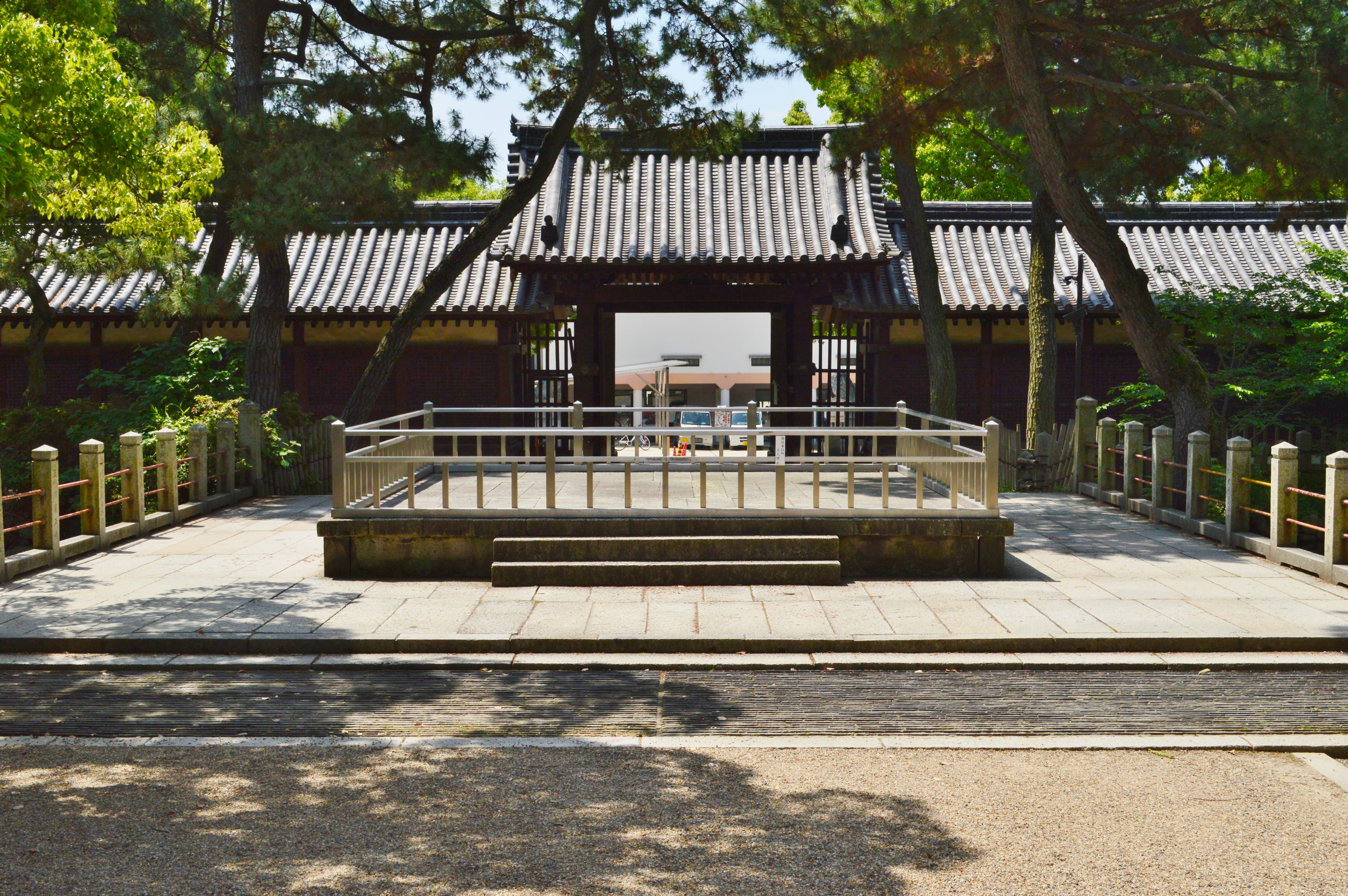 住吉大社 石舞台